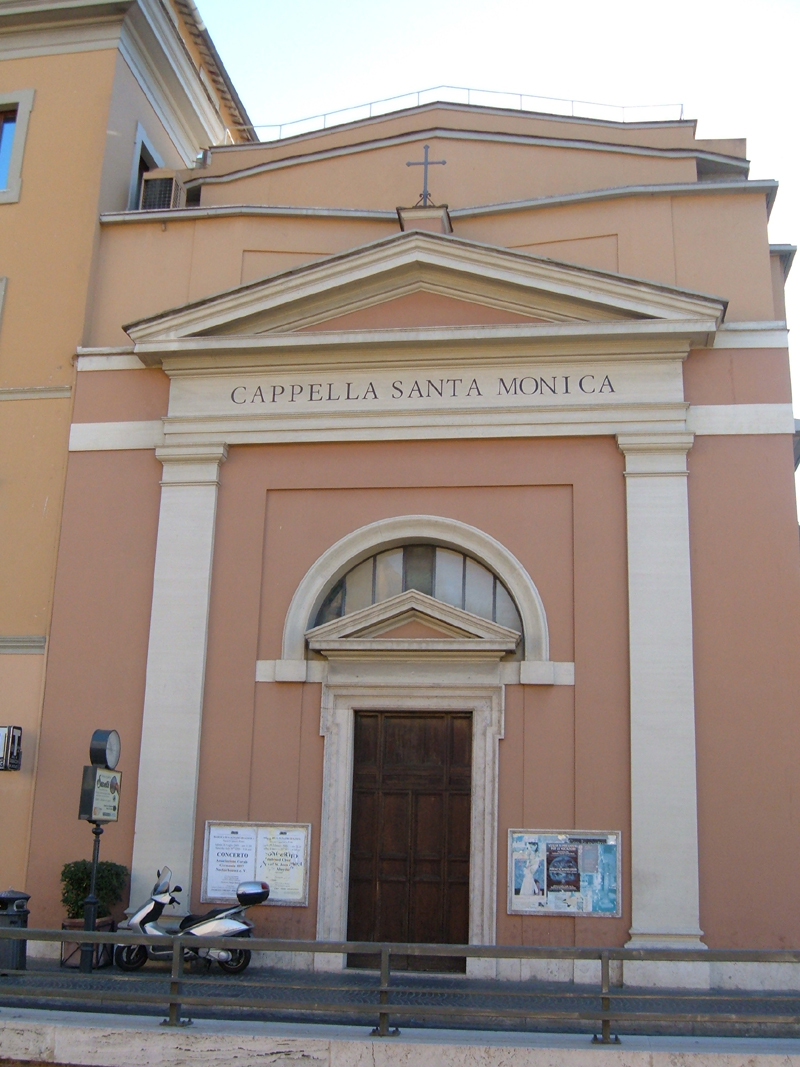 Cappella di Santa Monica